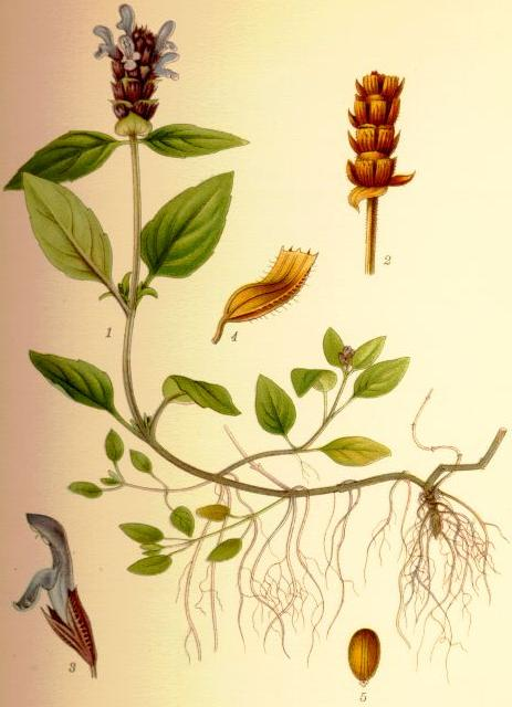 Brunört (Prunella vulgaris) ett tämligen storväxt exemplar, blomma (3/1), blomställning i fruktstadium, blomfoder (o, 3/1), en delfrukt (8/1).